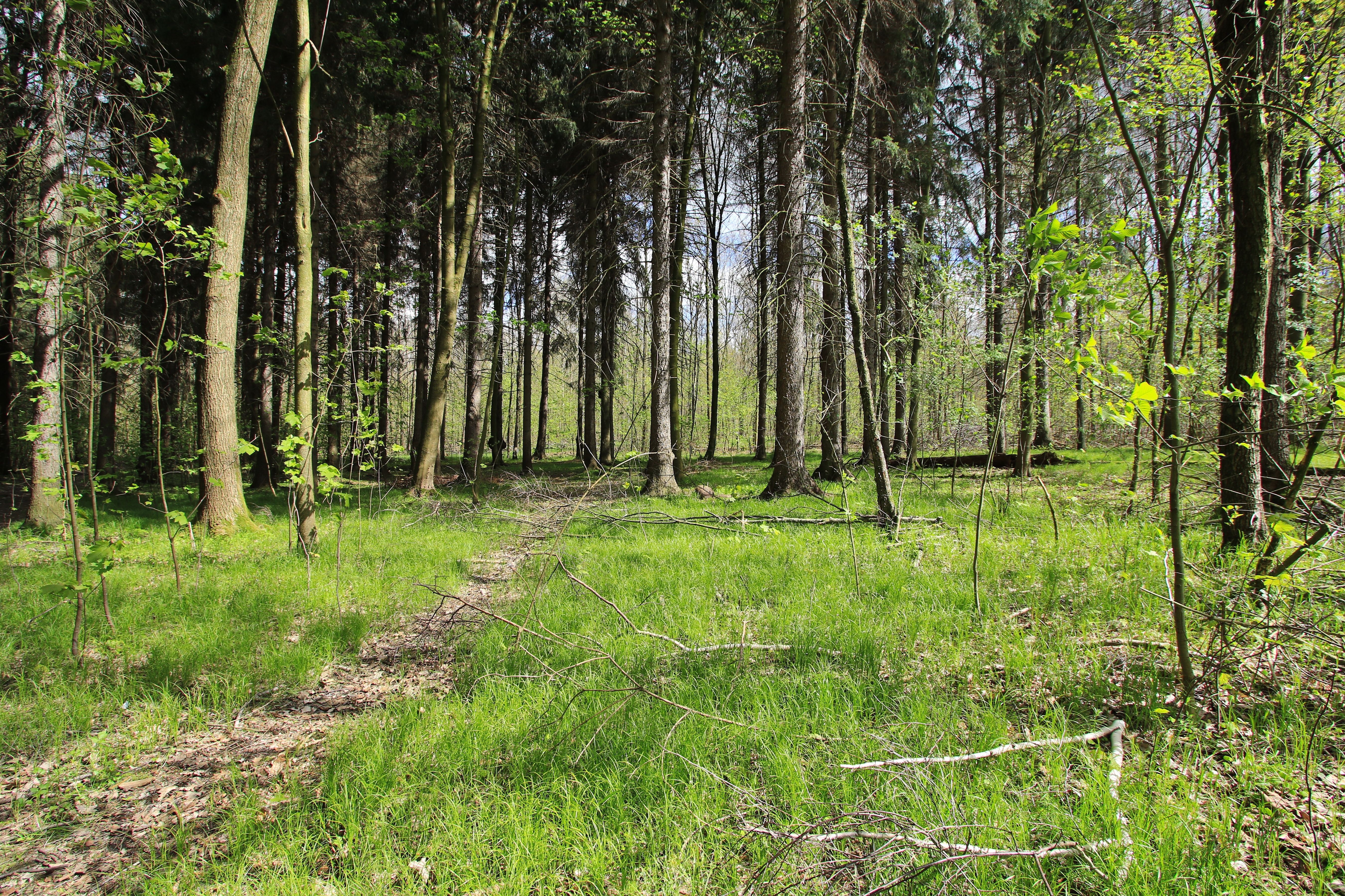 Naturschutzgebiet Zeisigwald bei Chemnitz..Sachsen.